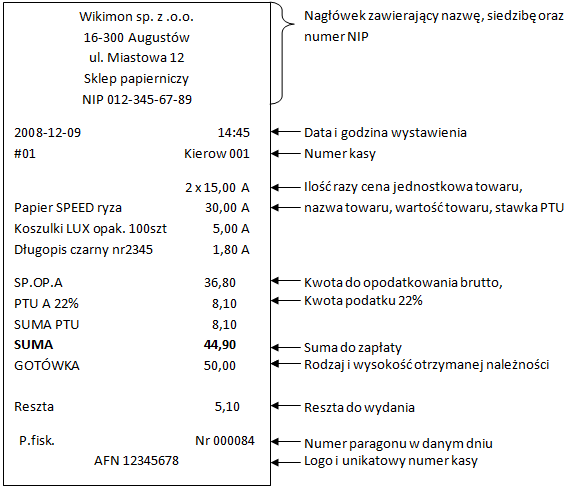 Przykład paragonu fiskalnego wraz z opisem